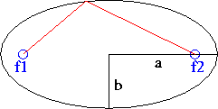 Ellips; eigen werk